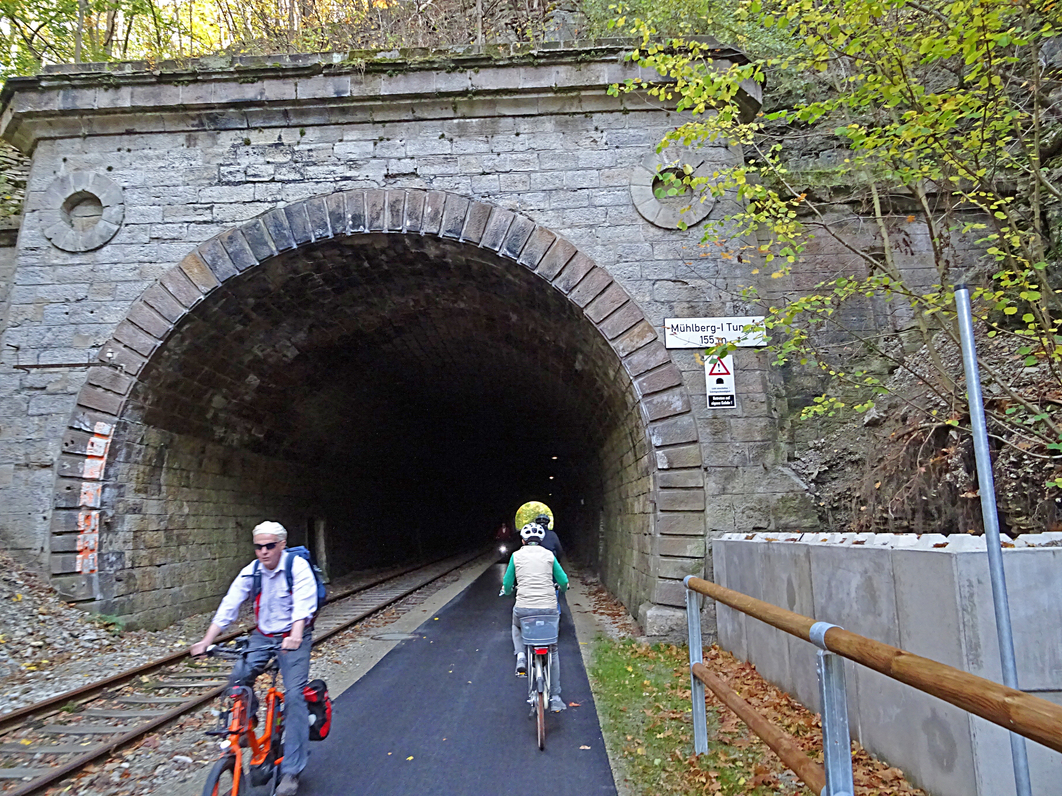 Mühlberg I Tunnel bei Effelder 155 m